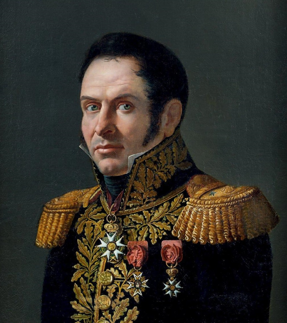 Louis Harlet (1772-1853), général de brigade et baron de l'Empire.